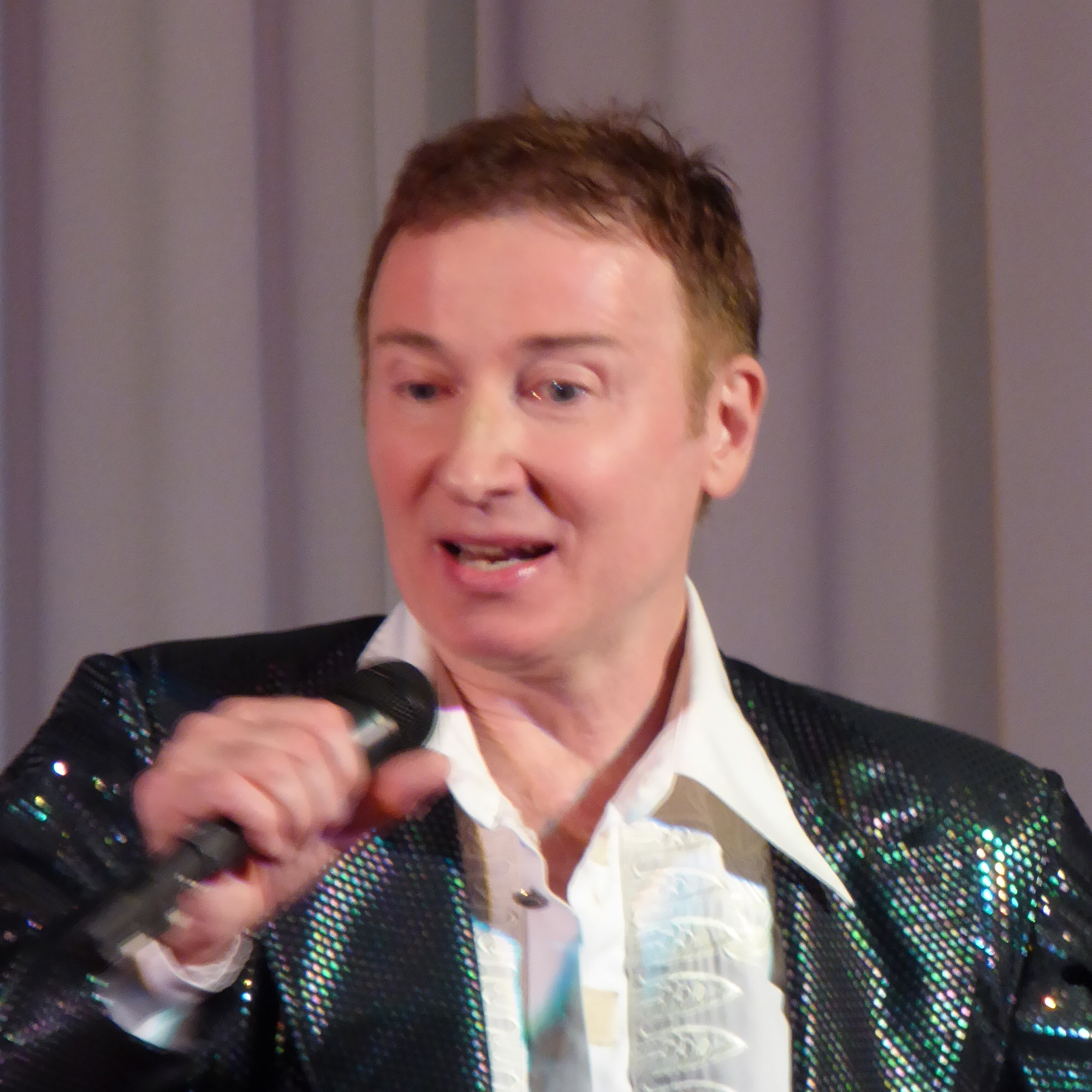 Attila Schimmer dum varieteo okaze de la 93-a Germana Esperanto-Kongreso en 2016 en Munkeno (DE).